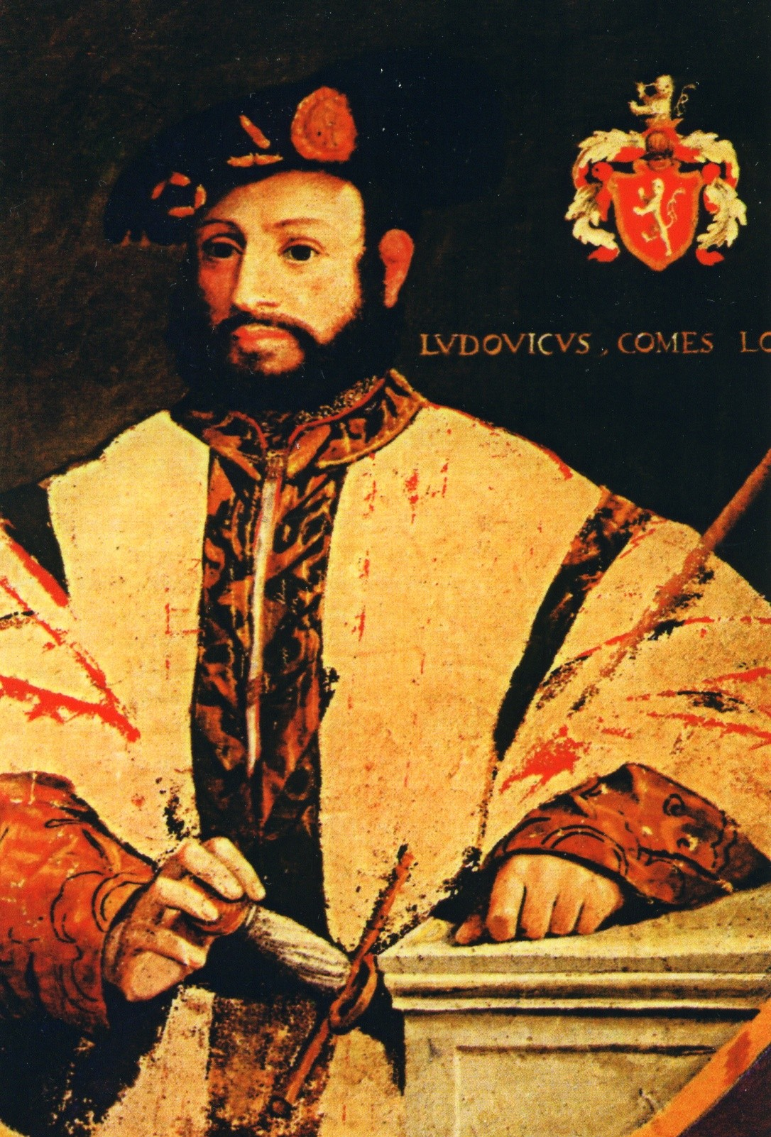 Ludovico Laudron